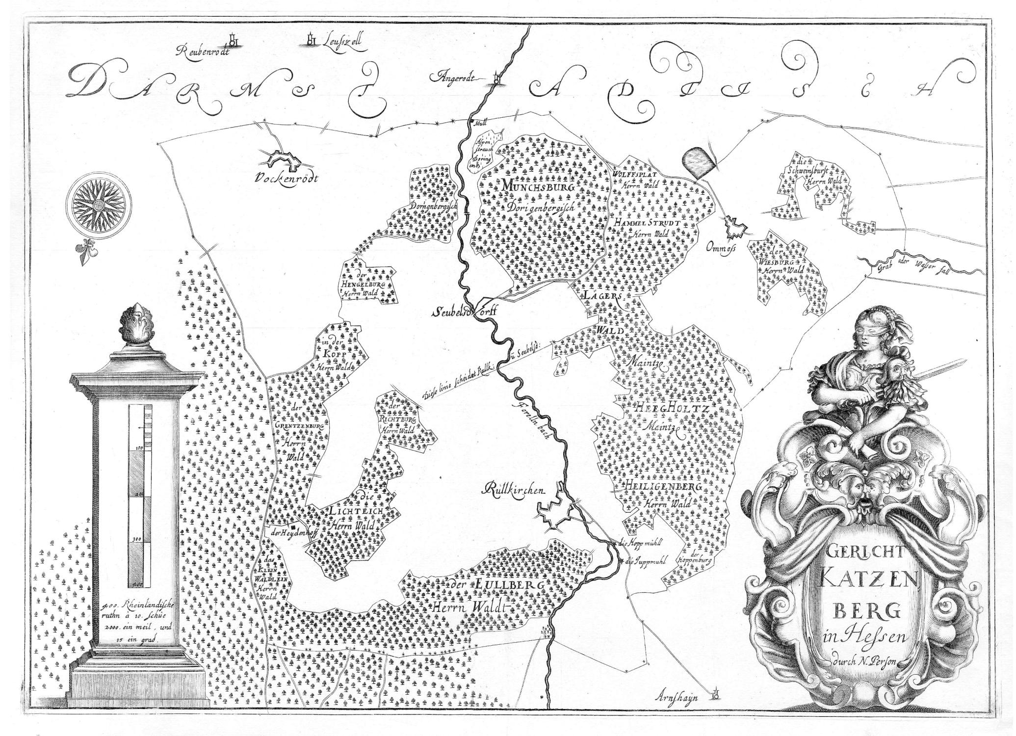 Gericht Katzenberg in Hessen: Eine Karte (Kupferstich) aus dem Atlas Novae Archiepiscopatus Moguntini Tabulae von dem Mainzer Kartographen Nikolaus Person aus dem Jahre 1694. Das Blatt ist nahezu nach Süden ausgerichtet und zeigt den Gerichtsbezirk Katzenberg in Hessen.